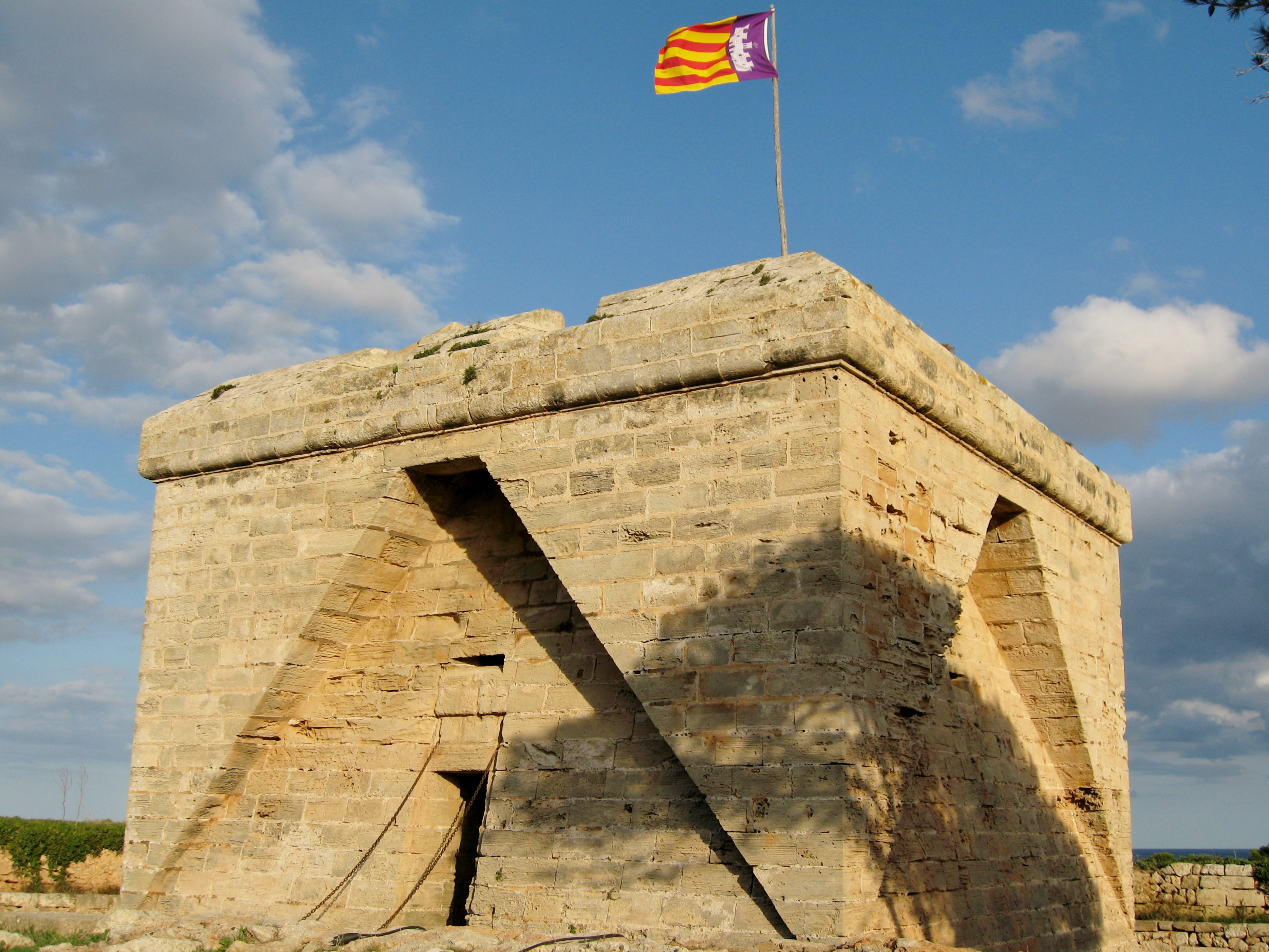 Es Castell de Sa Punta de n'Amer, Sant Llorenç des Cardassar, Mallorca, Spain